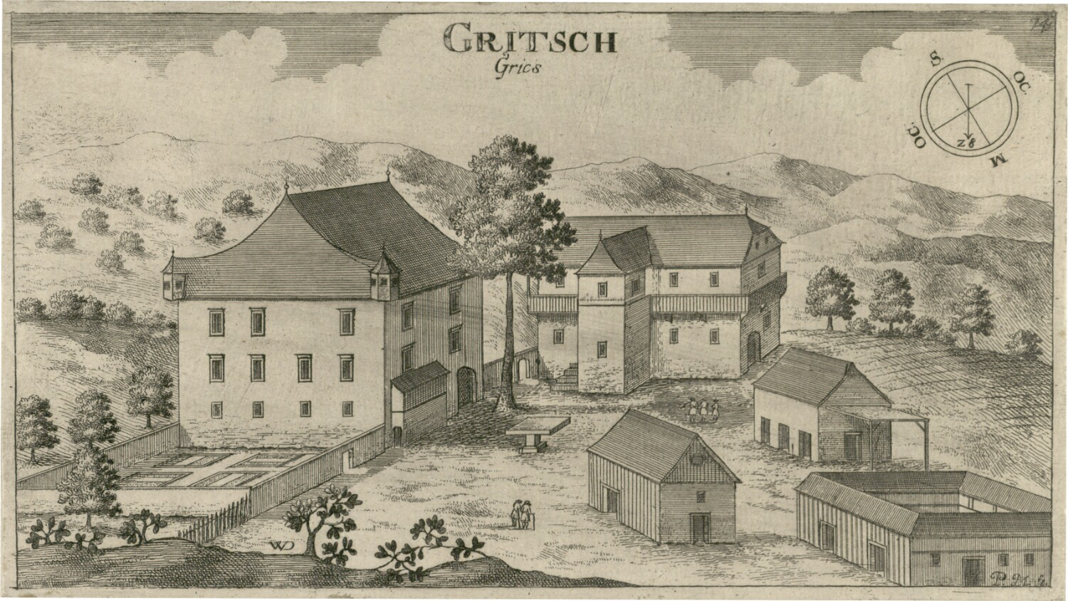 Dvorec Grič (Gritsch)